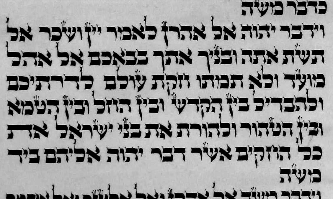 פרשת איסור לכהן לעבוד עבודת המקדש בשכרות ולהורות בהלכות התורה בעת שכרותו